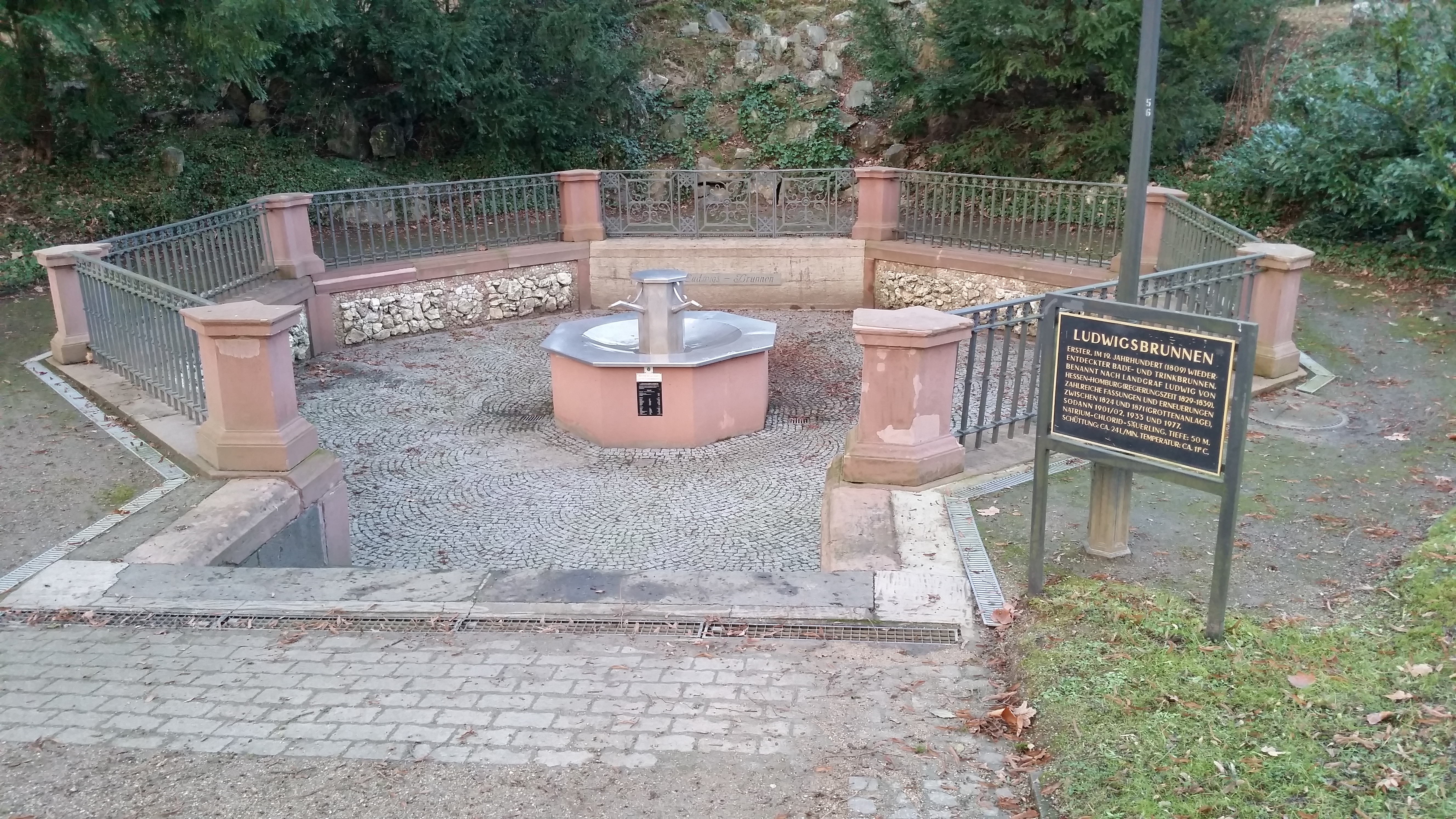 1809 wieder entdeckte Heilquelle, die schon den Römern bekannt war. Landgraf Ludwig veranlasste die Einfassung und der Brunnen wurde nach ihm benannt.